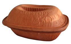 Afbeelding Römertopf. Zelf gemaakt met digitale camera.